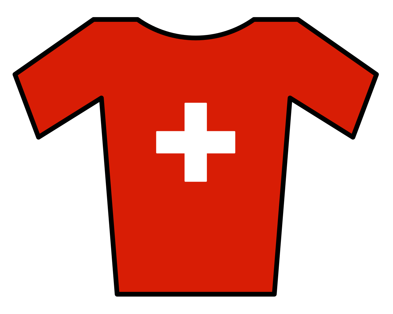 Maillot de Suiza